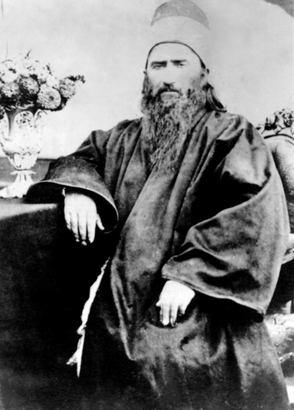 Mirza Huseinali Bahá